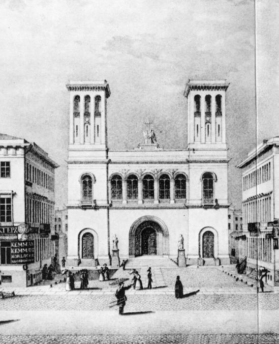 Лютеранская церковь Святого Петра. Фрагмент "Панорамы Невского проспекта". Литография П.С.Иванова по рисунку В.С.Садовникова. 1835